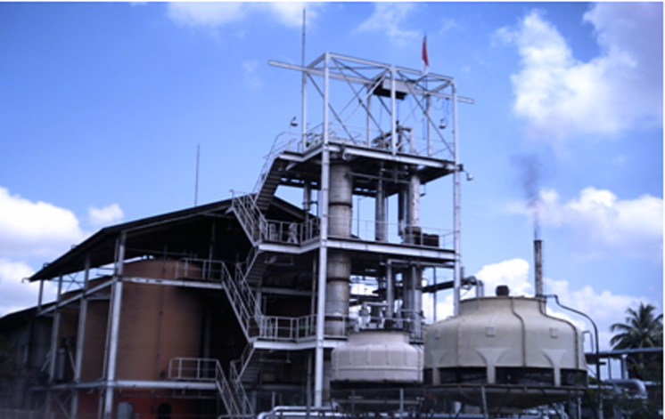 Produksi bersih pada industri